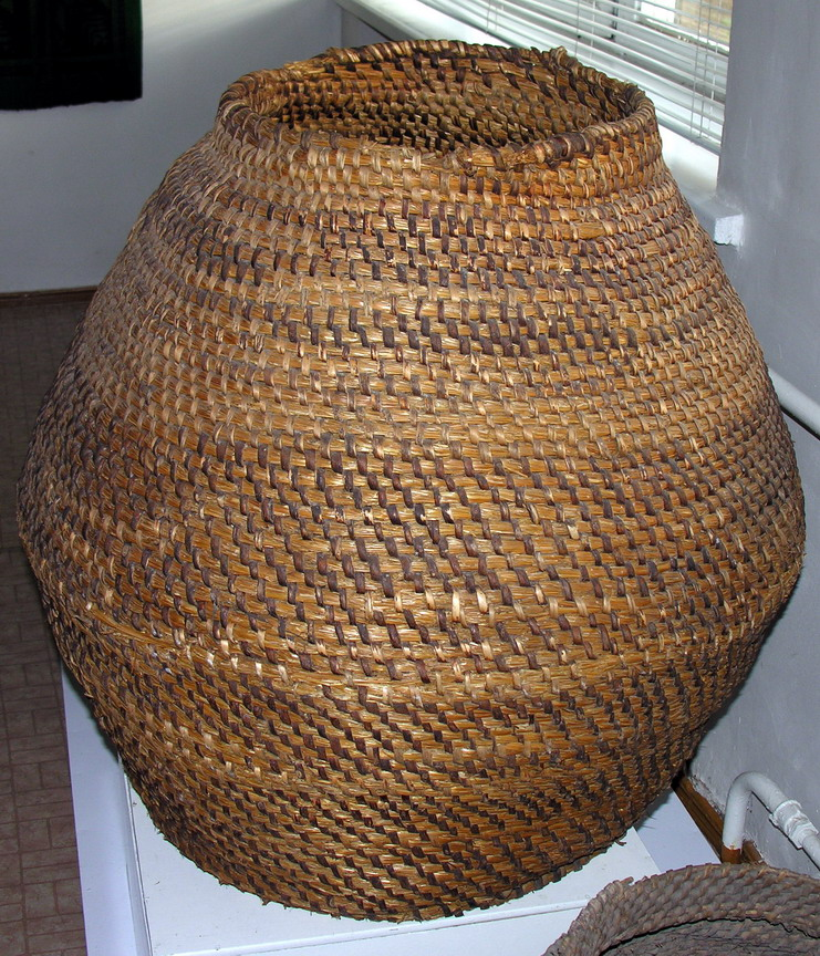 Karbija